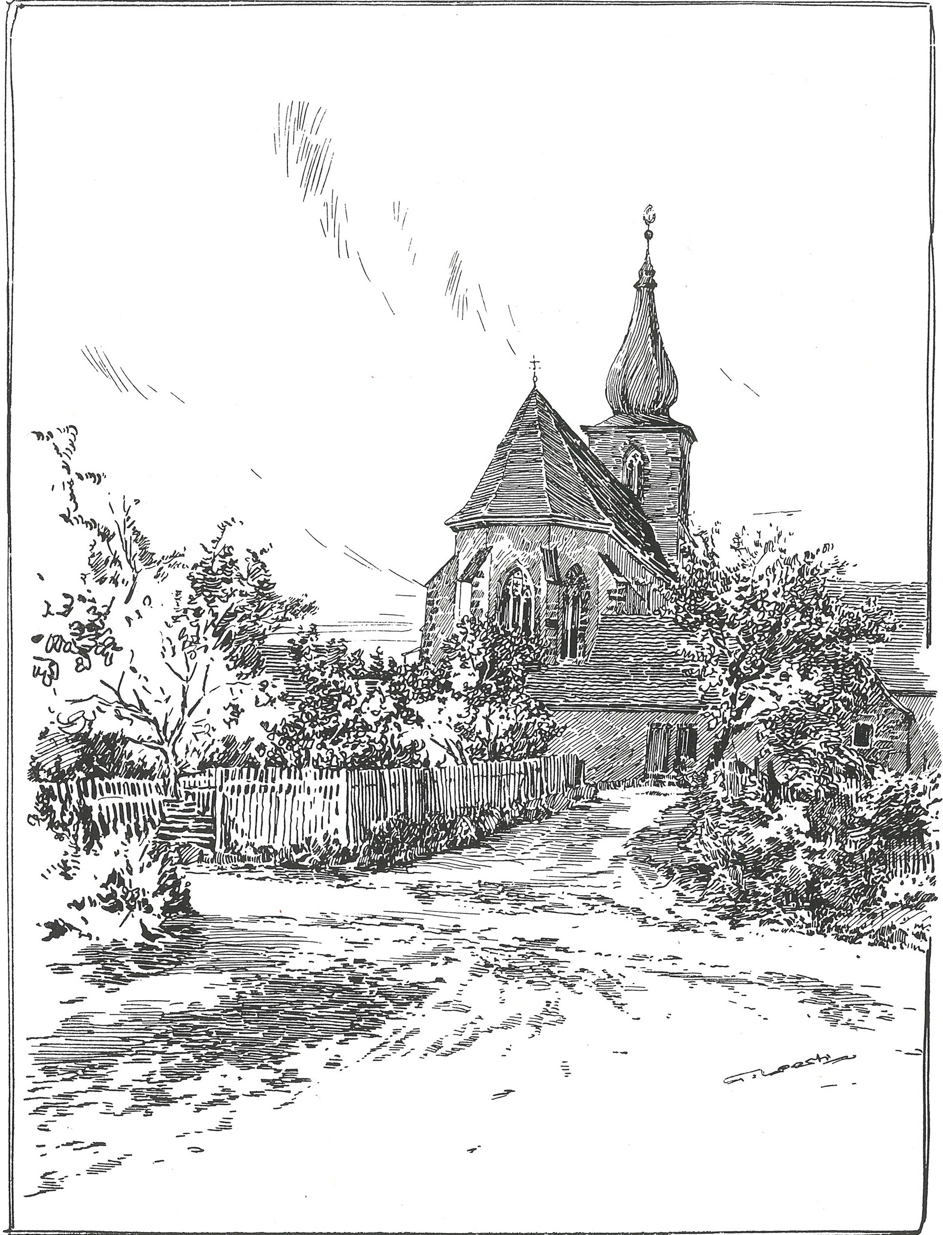 Karlinger, Hans: Die Kunstdenkmäler. S. 63.